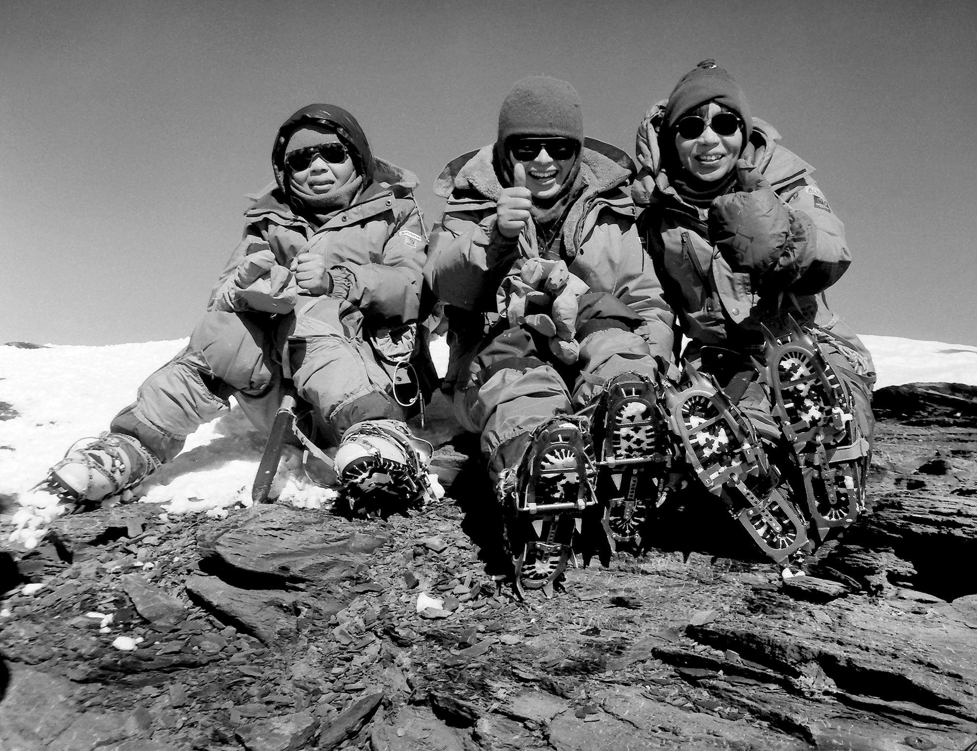 Junko Tabei Kommunismi mäetipus. Nobuko Yanagisawa, Mayuri Yasuhara ja Junko Tabei 85